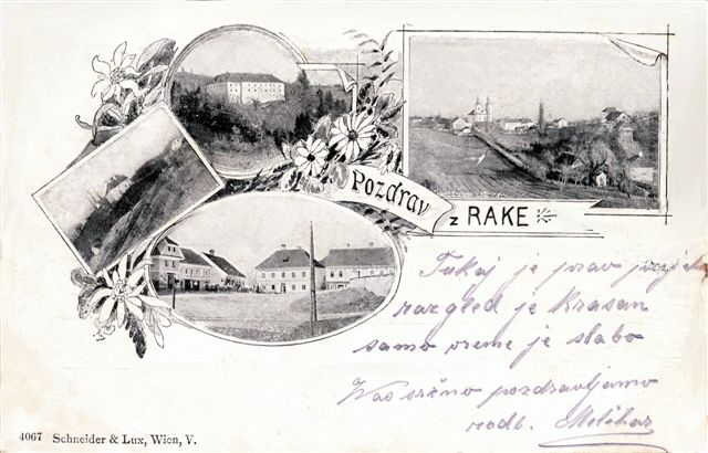 Grad Raka